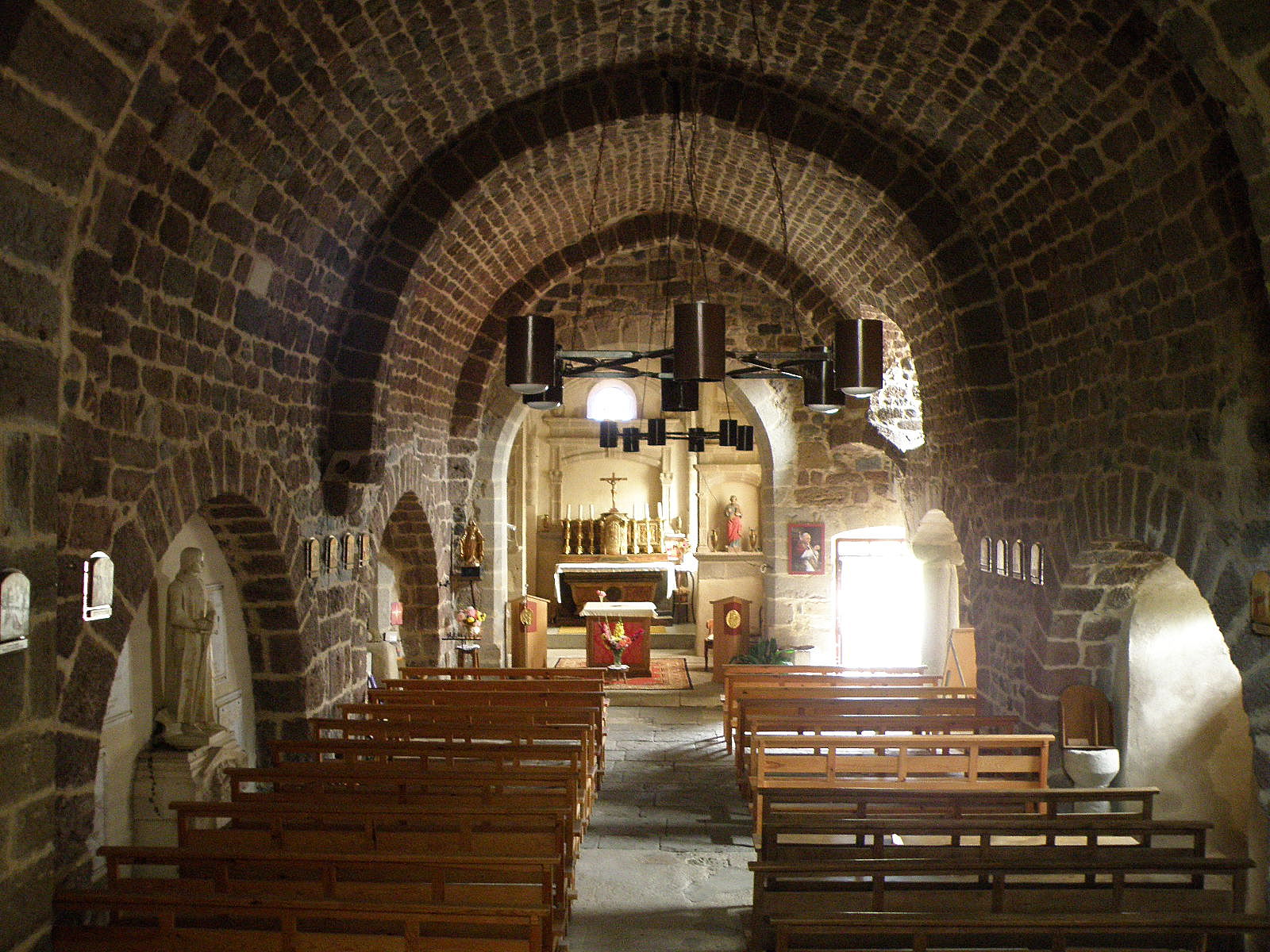 Saint-Geneys-près-Saint-Paulien, dép. de Haute-Loire, France (Auvergne). Église romane Saint-Barthélémy : nef à voûte en berceau et choeur (carré) avec autel et décor renaissance. Portail d'entrée à droite (forte luminosité), à encadrement remanié au XVIe siècle dans un sens renaissance.